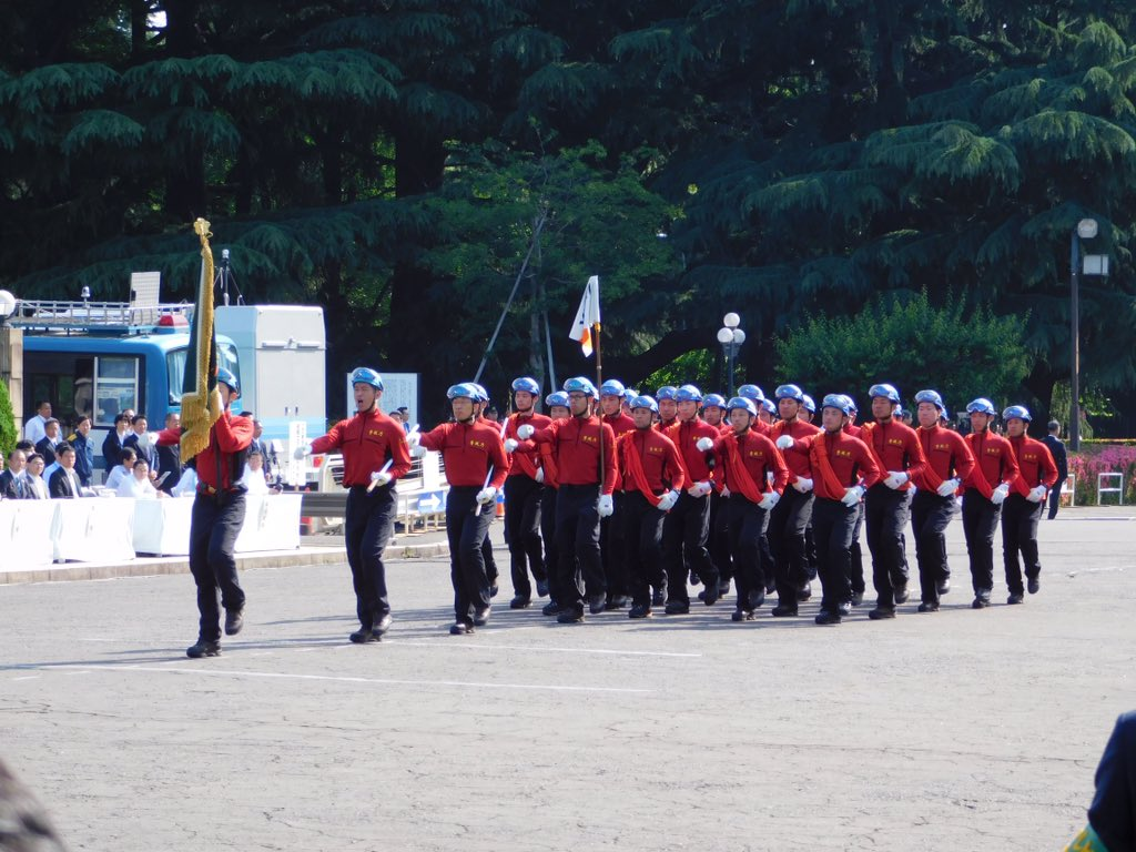 警視庁機動隊の山岳救助レンジャー部隊。2017年機動隊観閲式で撮影。